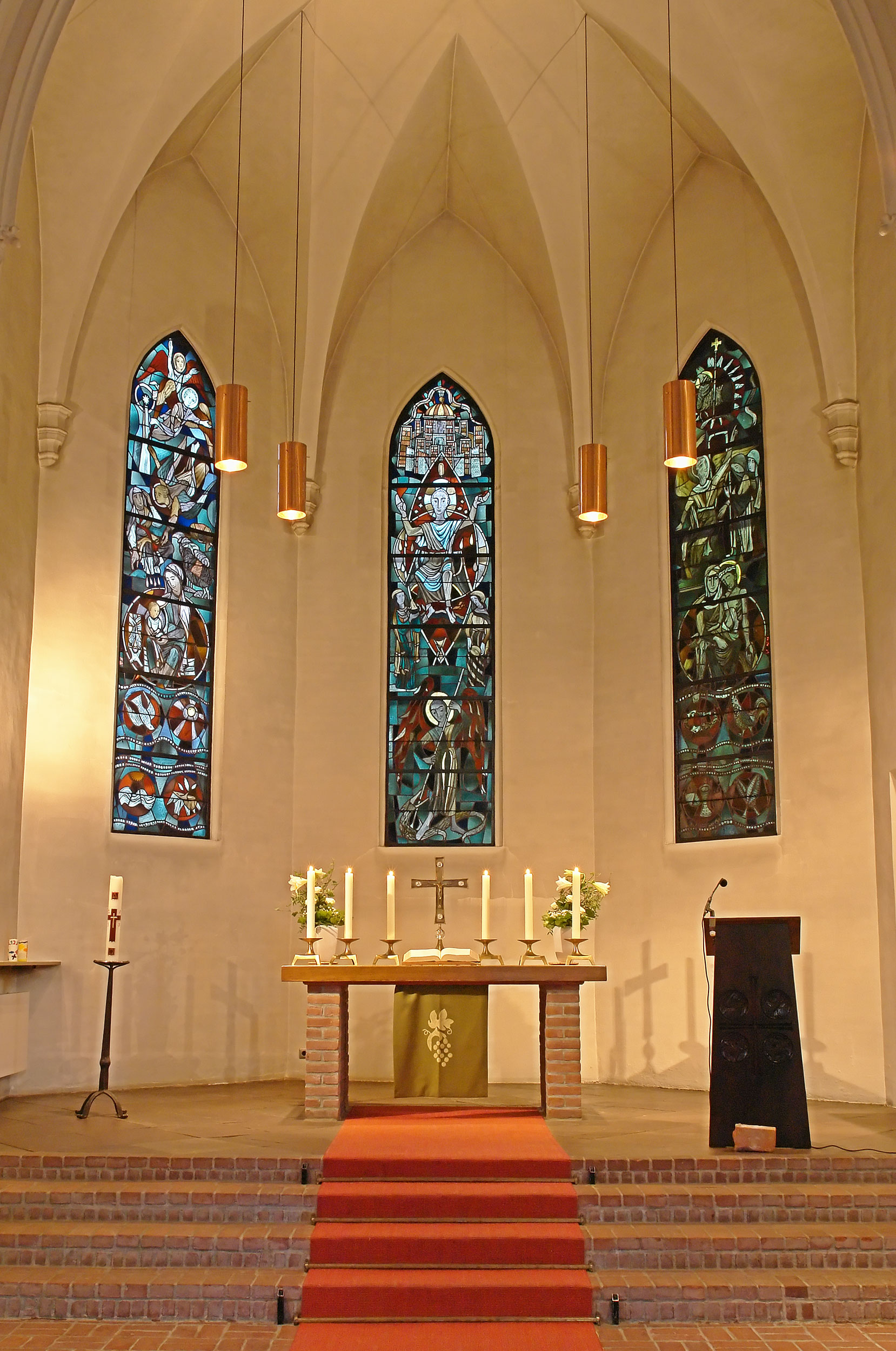 Alt Hastedter Kirche in Bremen, Bennigsenstraße 7Das abgebildete Objekt ist ein geschütztes Kulturdenkmal in der Freien Hansestadt Bremen, mit der Nr. 0121 beim Landesamt für Denkmalpflege registriert.